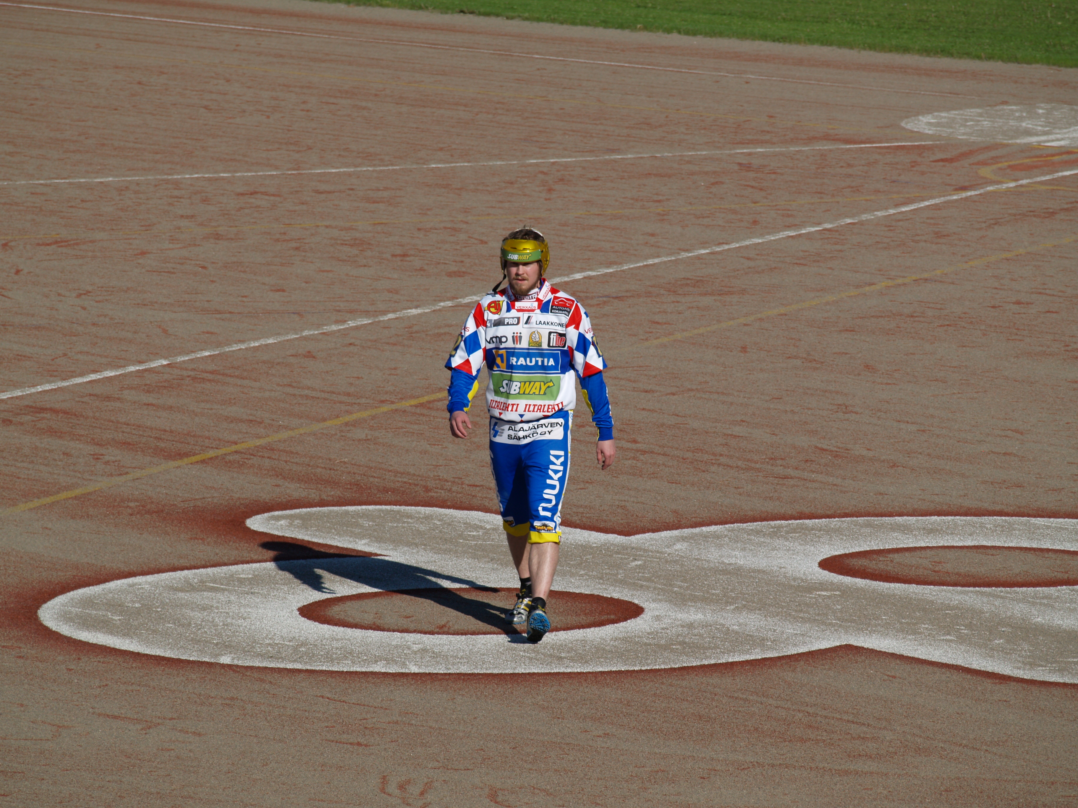 Alajärven Ankkurit - Vimpelin Veto pesäpallo-ottelu 23.6.2015. Kuvassa Sami Mikkolanaho.